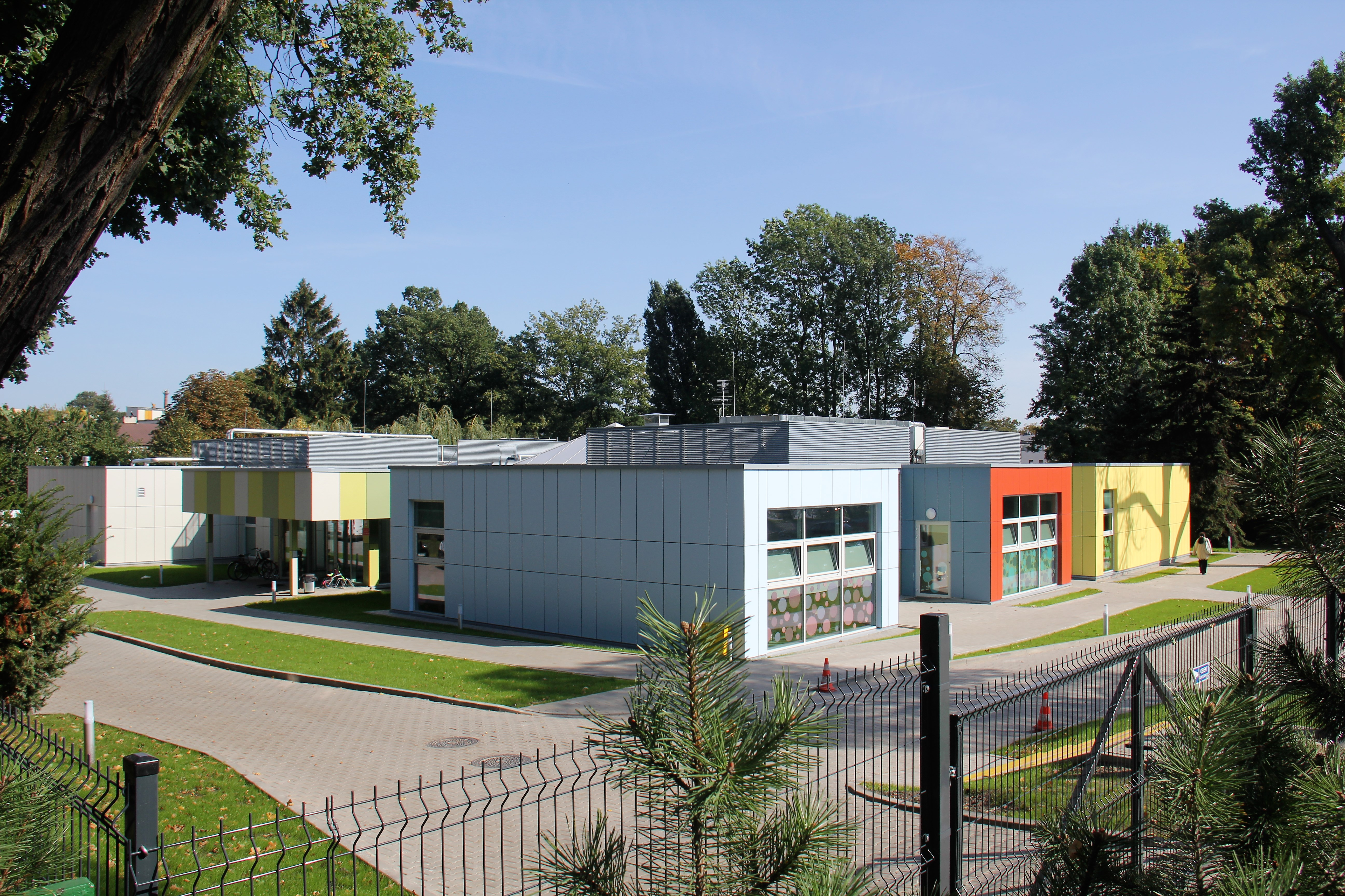 Przedszkole wykonane w technologii modułowej